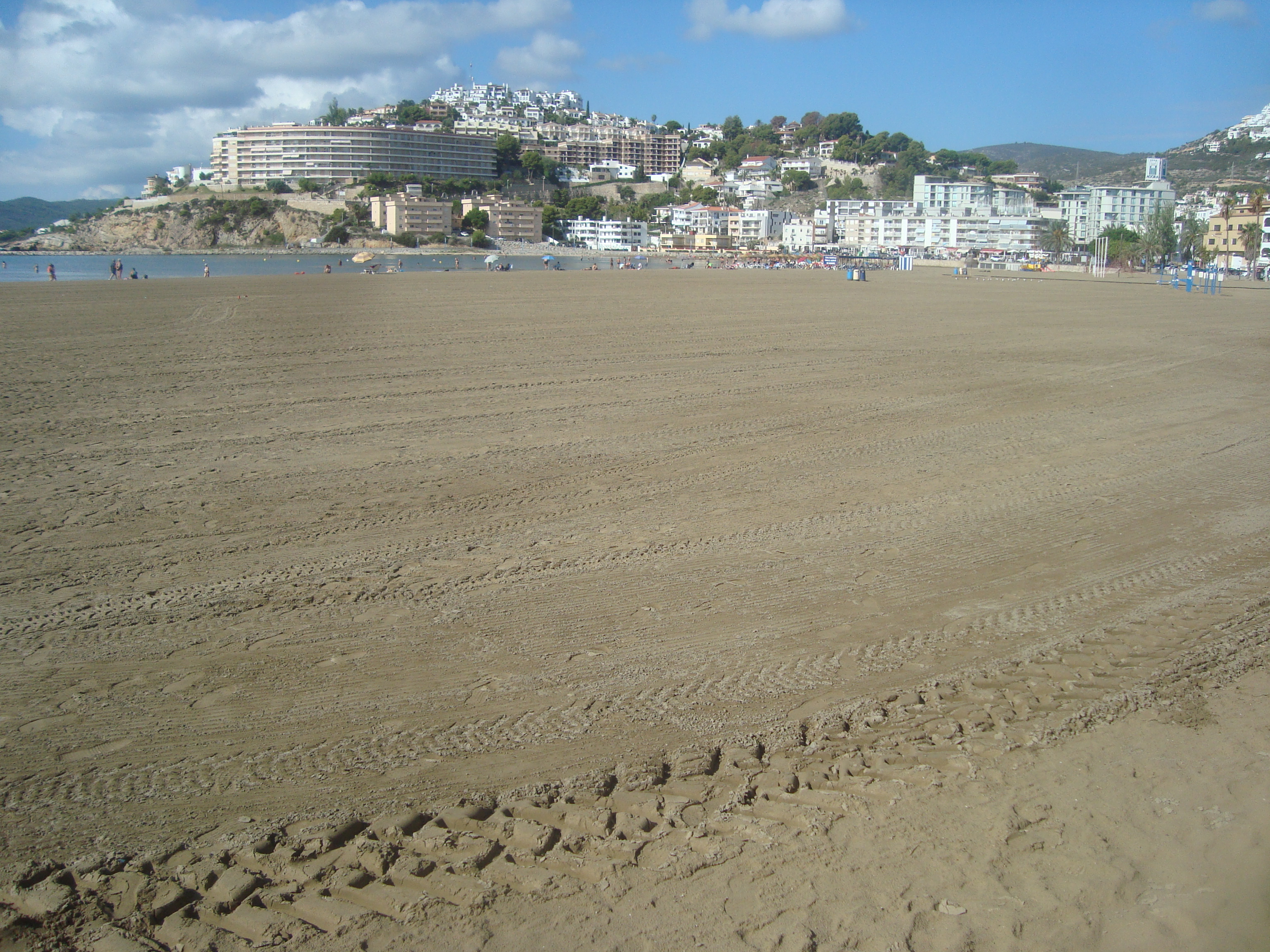 Platja Sud (Peníscola)